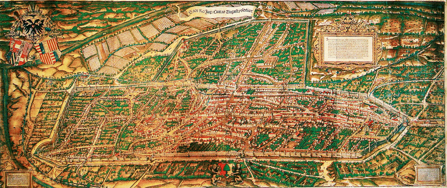 Vogelschauplan Augsburgs von Westen